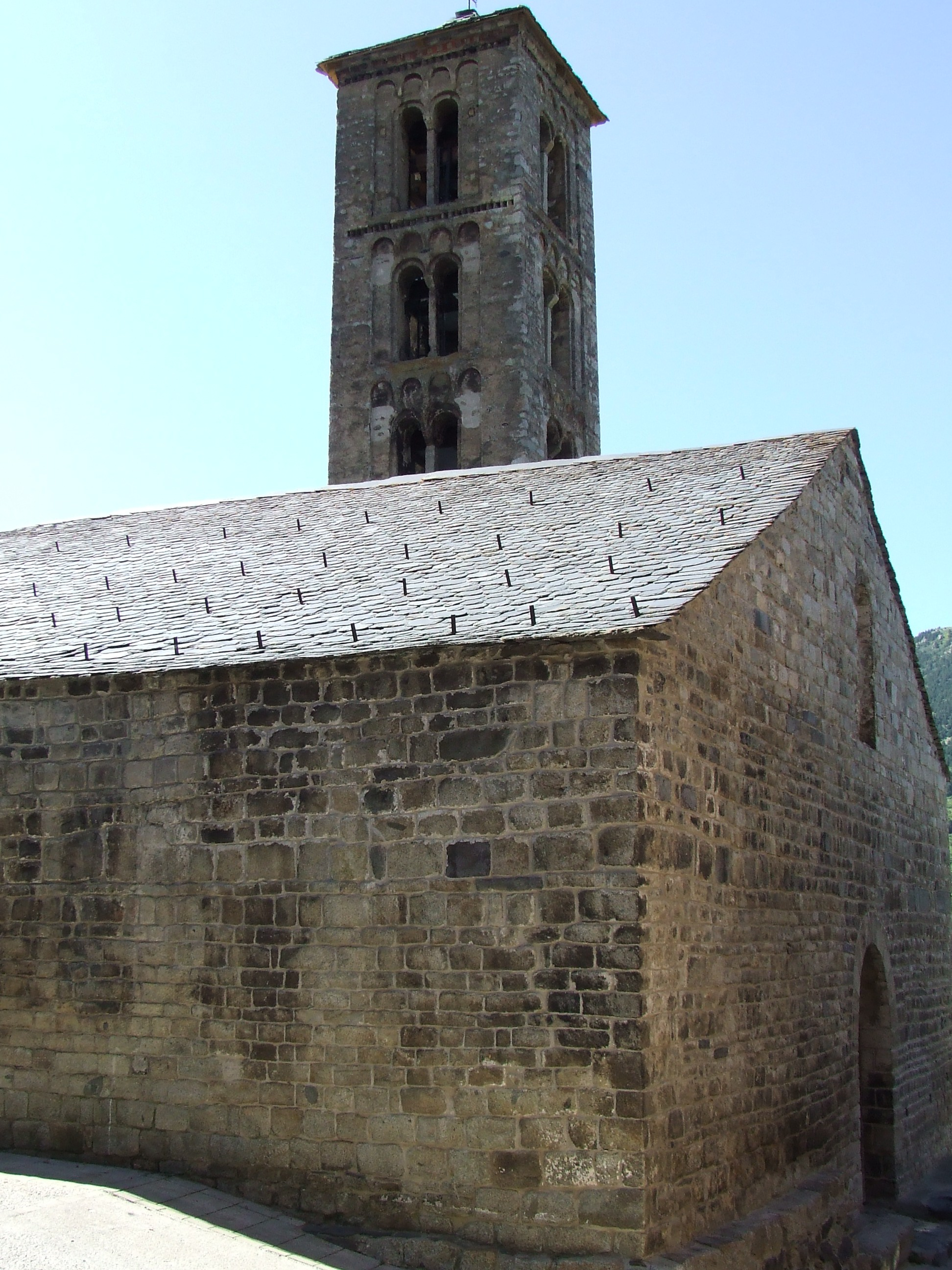 Façana de ponent de Santa Maria de Taüll (Vall de Boí, Alta Ribagorça)